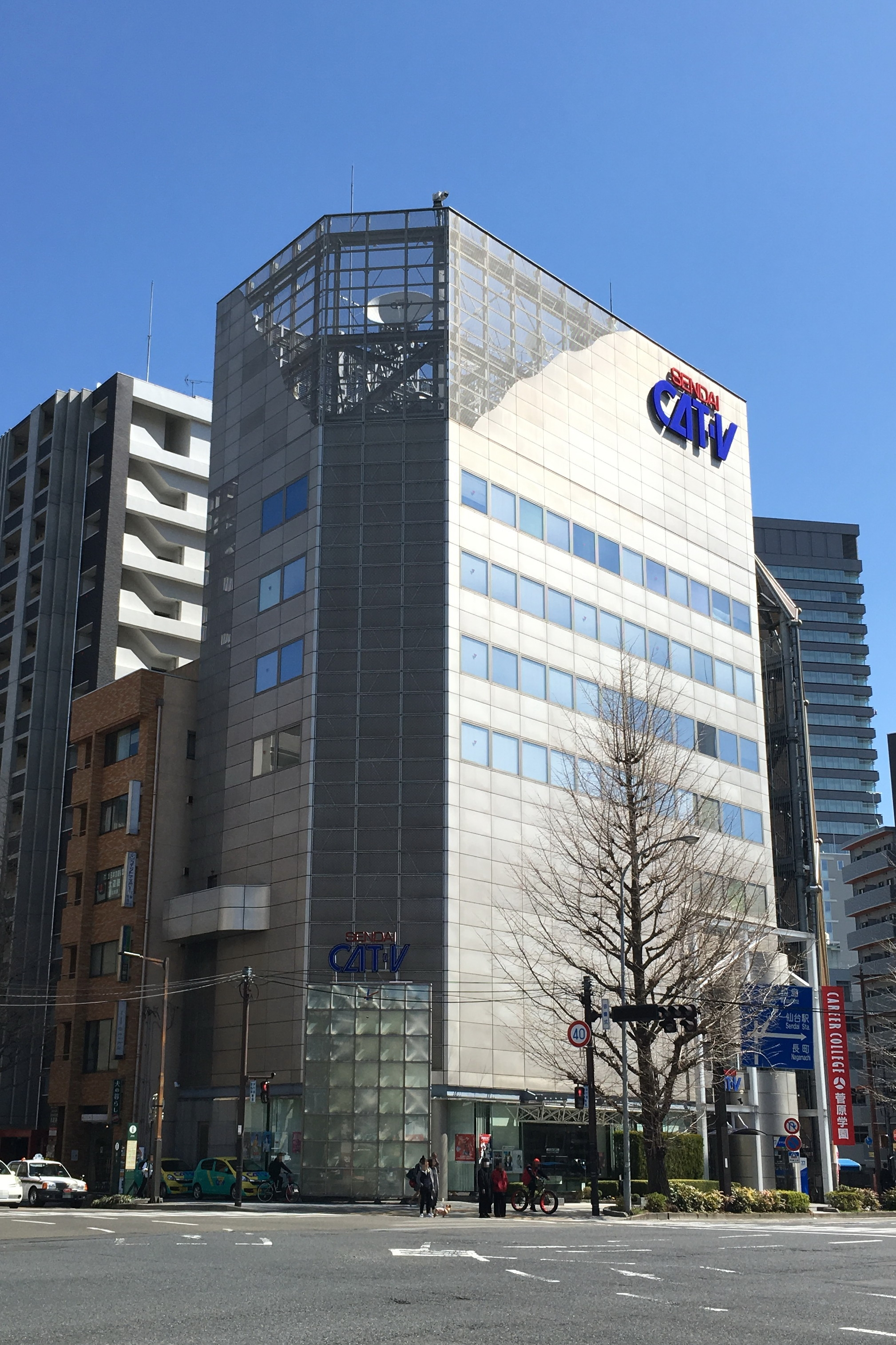 仙台CATV